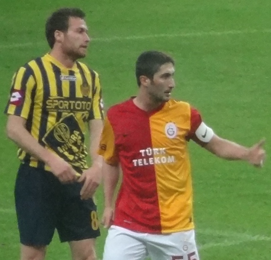 Serol Demirhan ve Sabri Sarıoğlu 25 Ocakta Türk Telekom Arena'da çekilmiş bir fotoğraf.